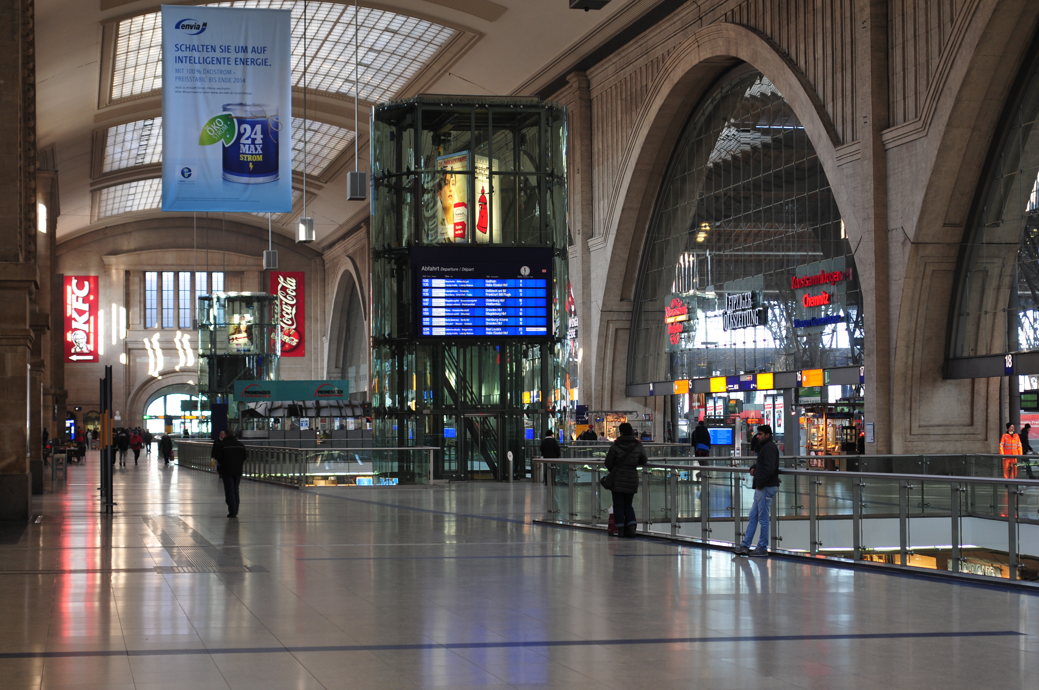 Bahnhof Leipzig Übersicht Haupthalle: auch hier ist kein Weitwinkel nötig, 50 mm sind passend